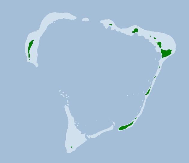 Atolón Coroa (Rongerik)